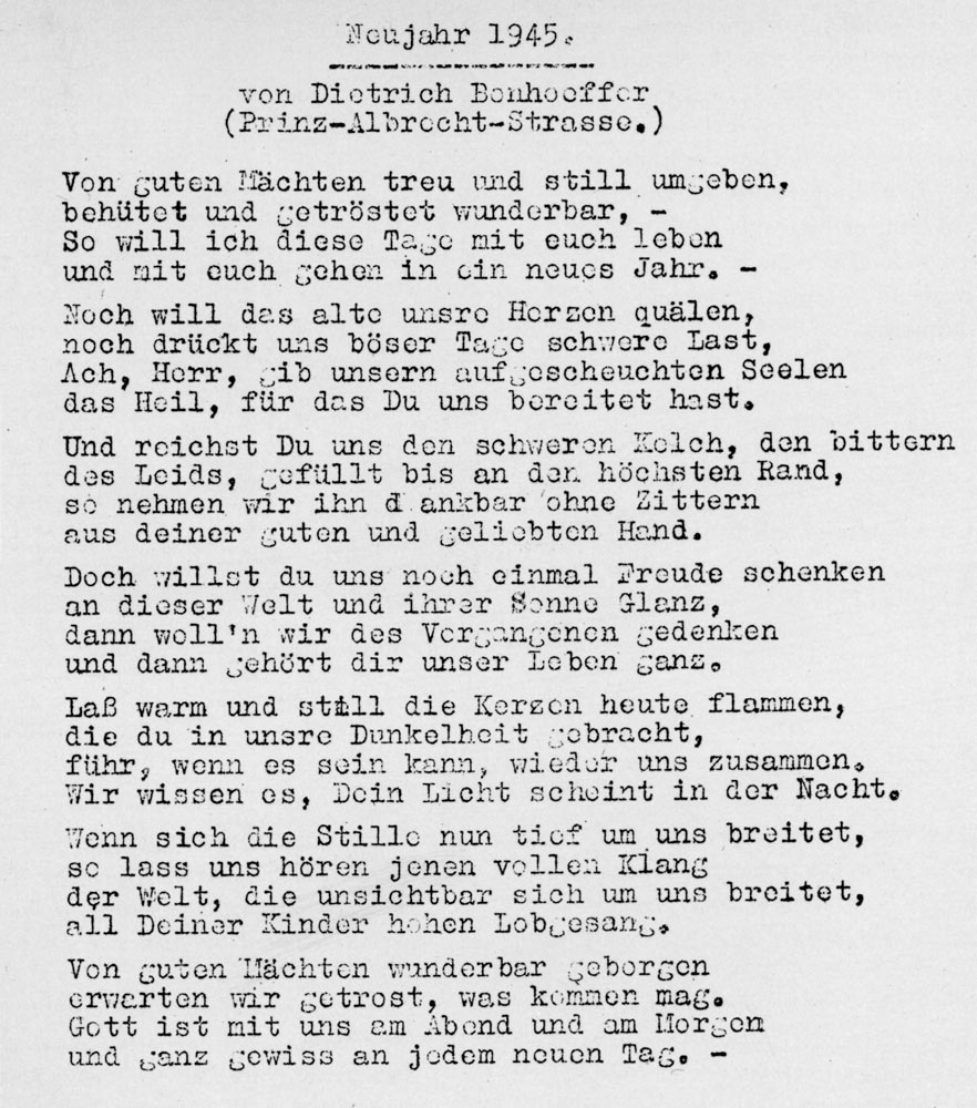 Dietrich Bonhoeffer: Von guten Mächten; Schreibmaschinenabschrift eines Unbekannten aus dem Jahr 1945 mit einigen Textvarianten gegenüber dem Autograph. Diese Version war der gebräuchliche Liedtext bis zur Veröffentlichung des Autographs 1988